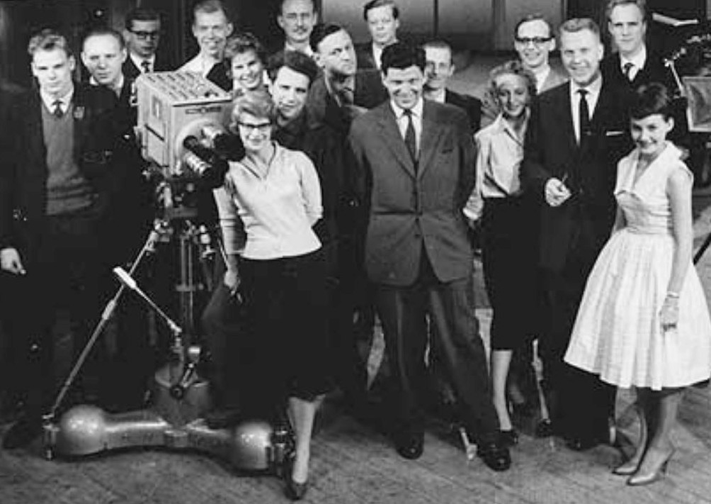 Bilden är tagen på Cirkus i samband med en Kvitt eller Dubbelt sändning. T.h. om kameran: Mona Haskel, scripta och Nils Erik Bæhrendtz, programledare sedan Birgit Porry ateljévärdinna, Tage Danielsson och Maud Jonsson, studiovärdinna.